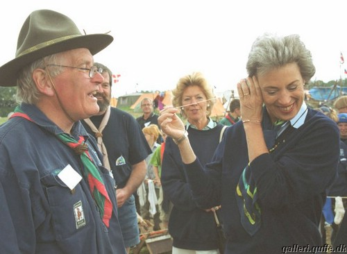 H.K.H.Prinsesse Benedikte på Blå Sommer